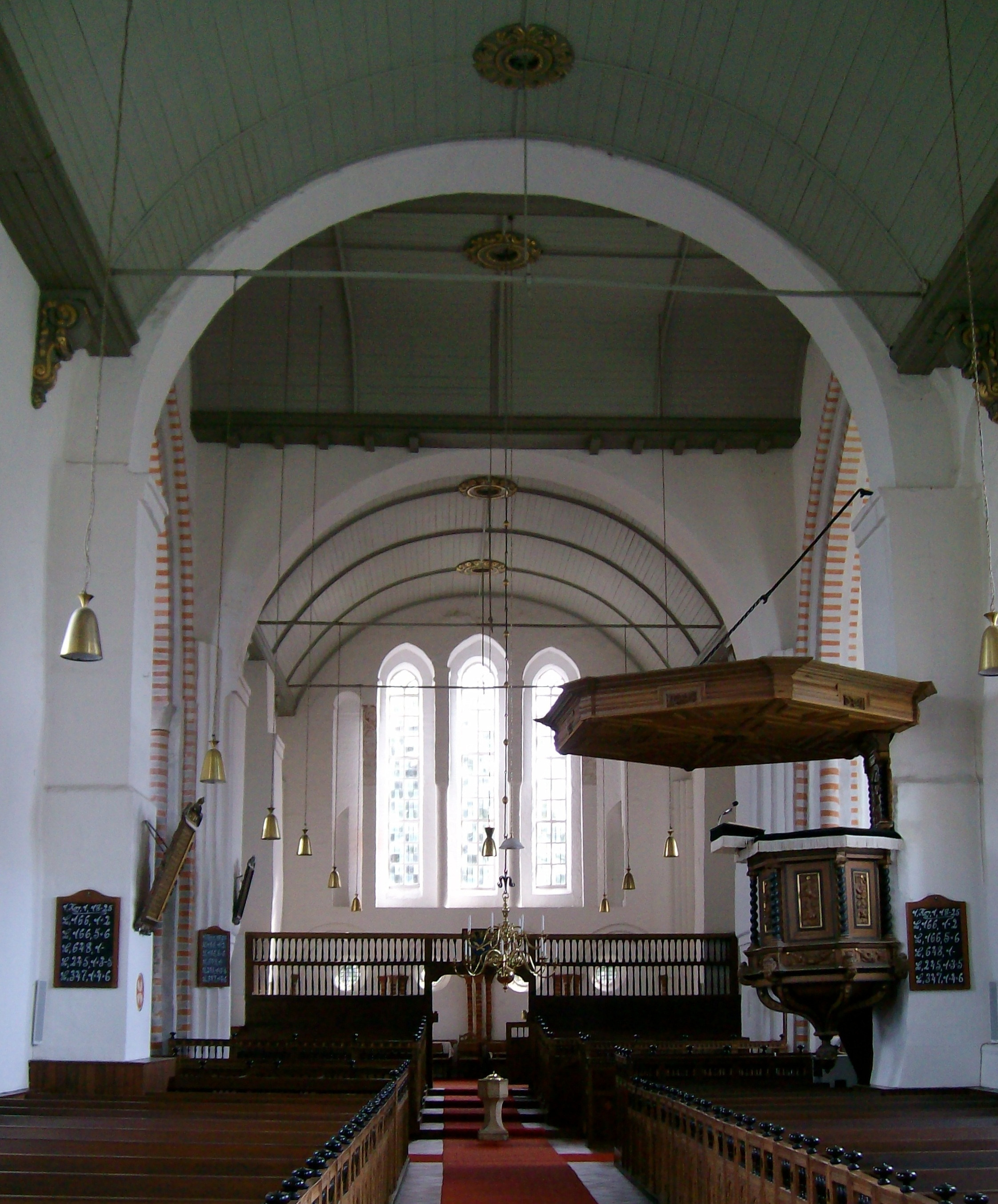 Reformierte Kirche Bunde, Kirchschiff